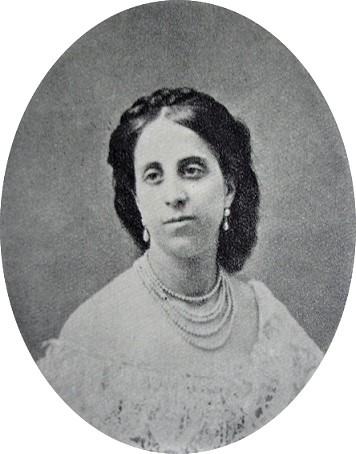 Laura Acton Minghetti (1829-1915)